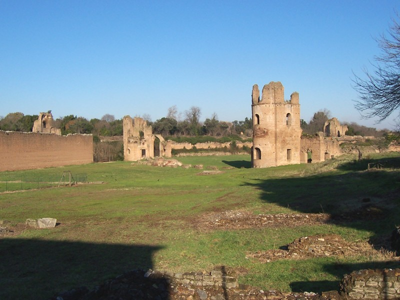 Roma - Circo di Massenzio sulla Via Appia